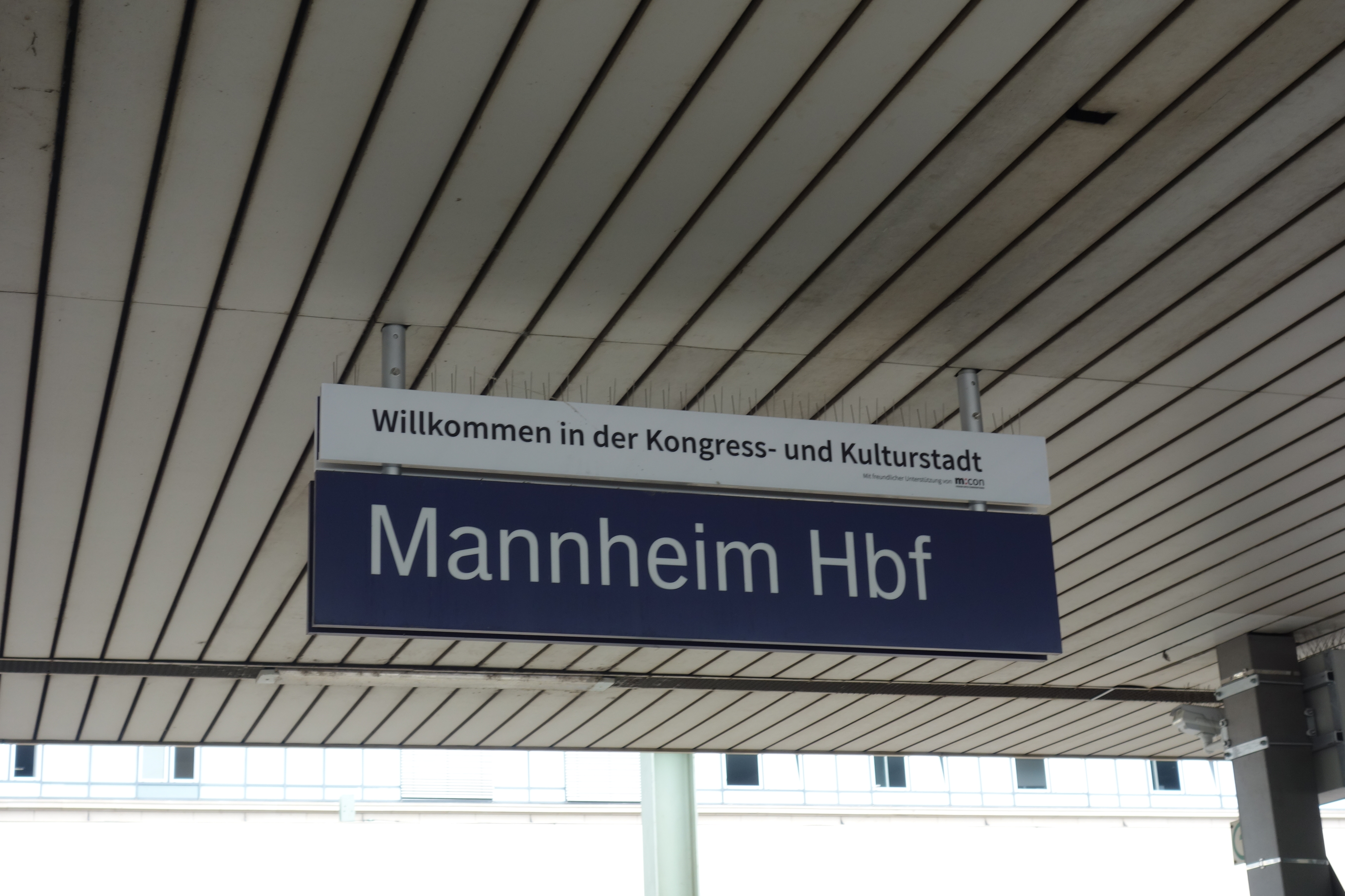 Willkommen in der Kongress- und Kulturstadt. Mannheim Hbf.